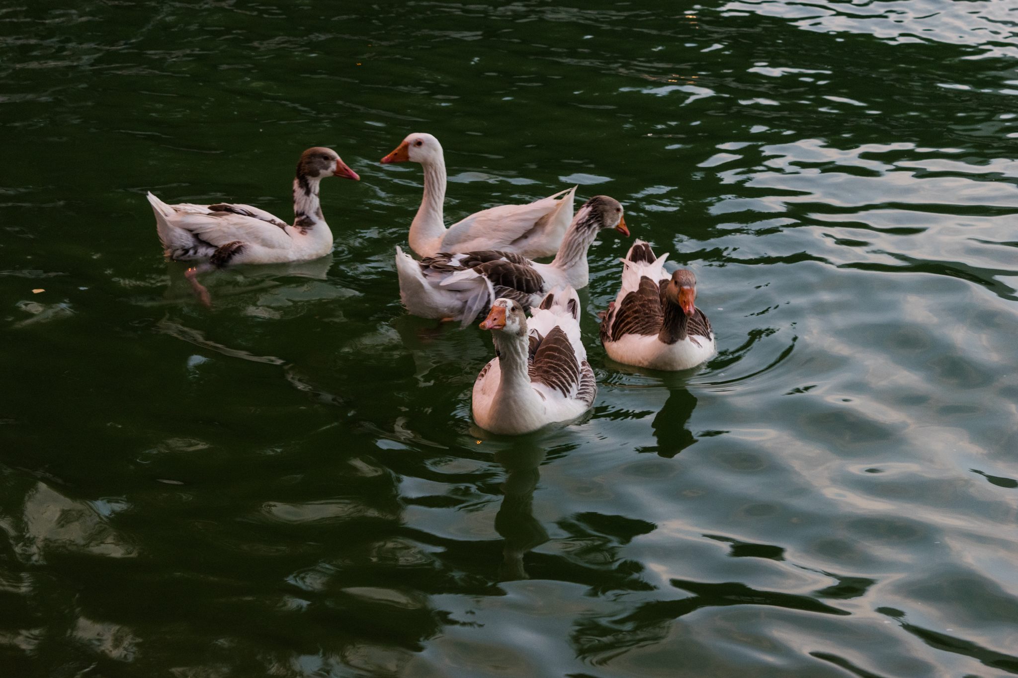 اکو سیستم زیبای دریاچه کیو